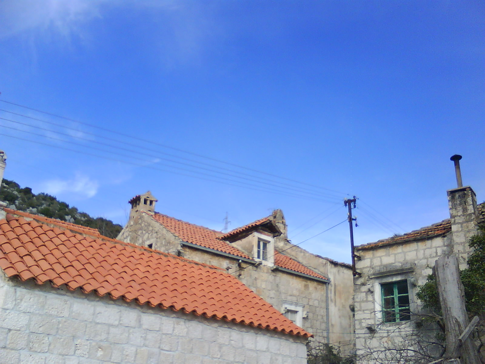 Stankovići, a village close to Orebić